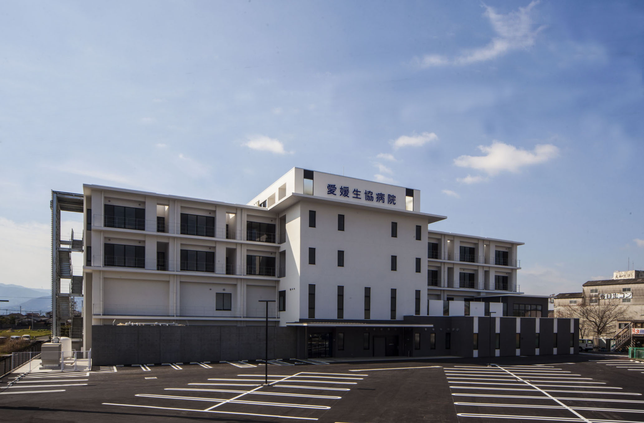 愛媛生協病院